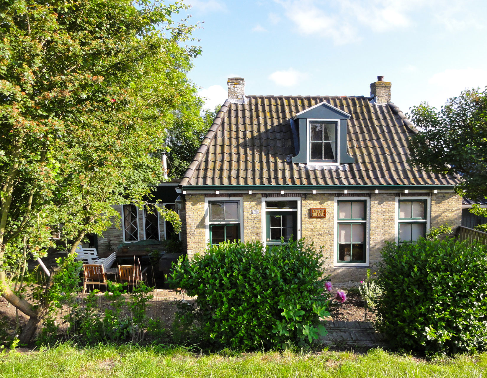 Oudebildtdijk 770 in Sint-Jacobiparochie